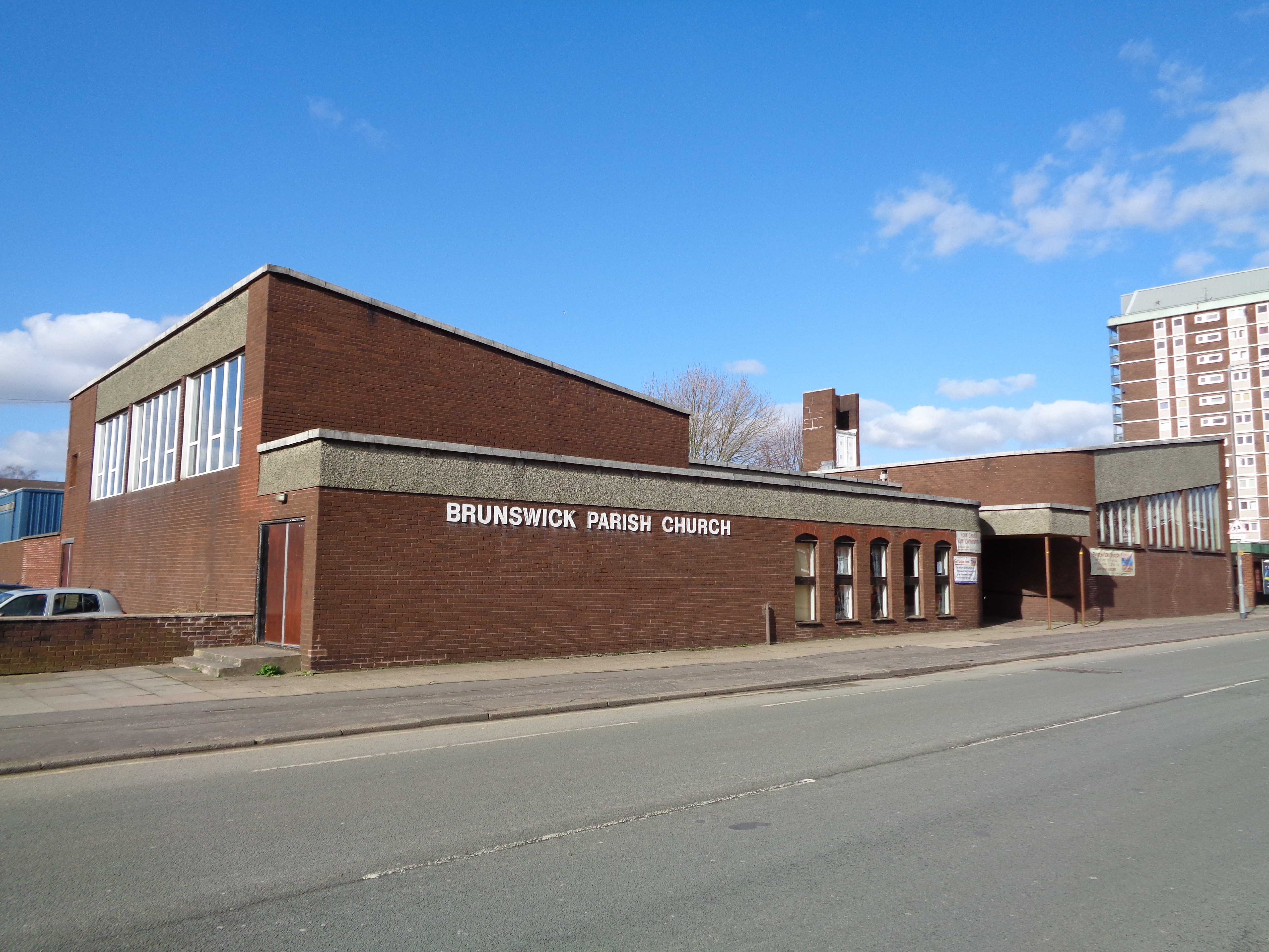 Brunswick Parish Church, Brunswick Street, Manchester.